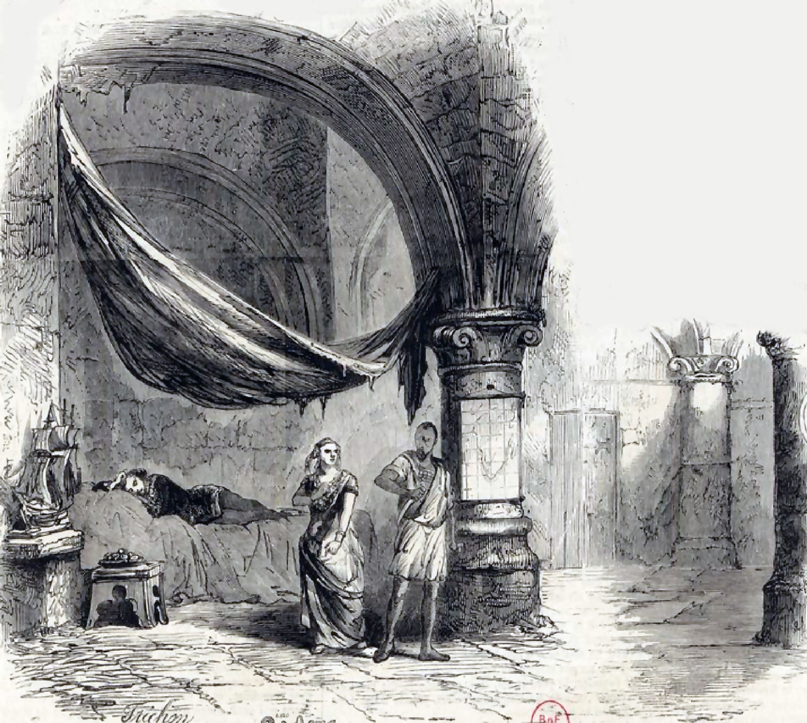 Acte II de L'Africaine de Meyerbeer